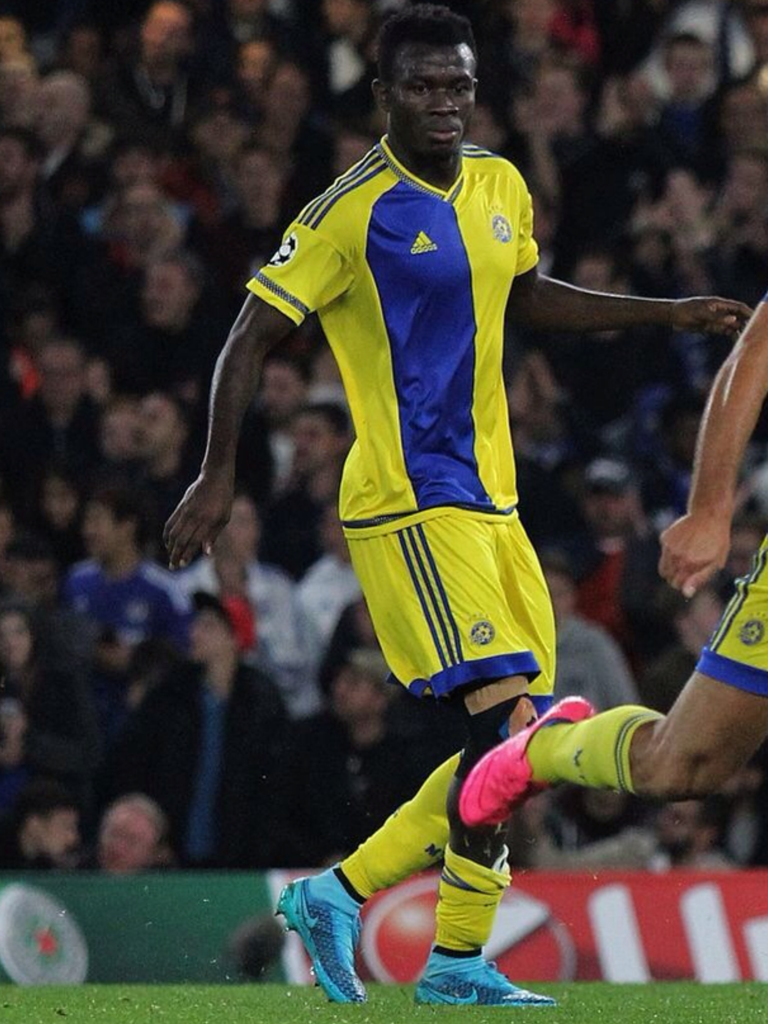 נוסא איגיבור במדי מכבי תל אביב נגד צ'לסי, 2015